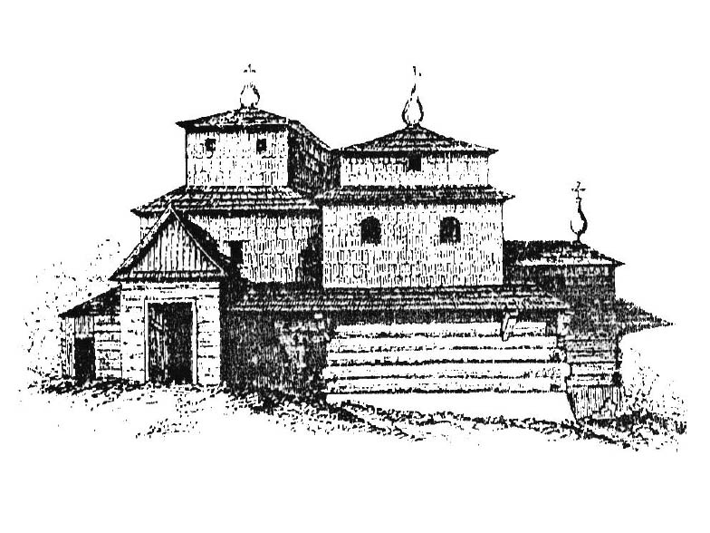 Стара церква в місцевості Знесіння у Львові. Рисунок 1858 року, автор Адольф Вольфскрон.